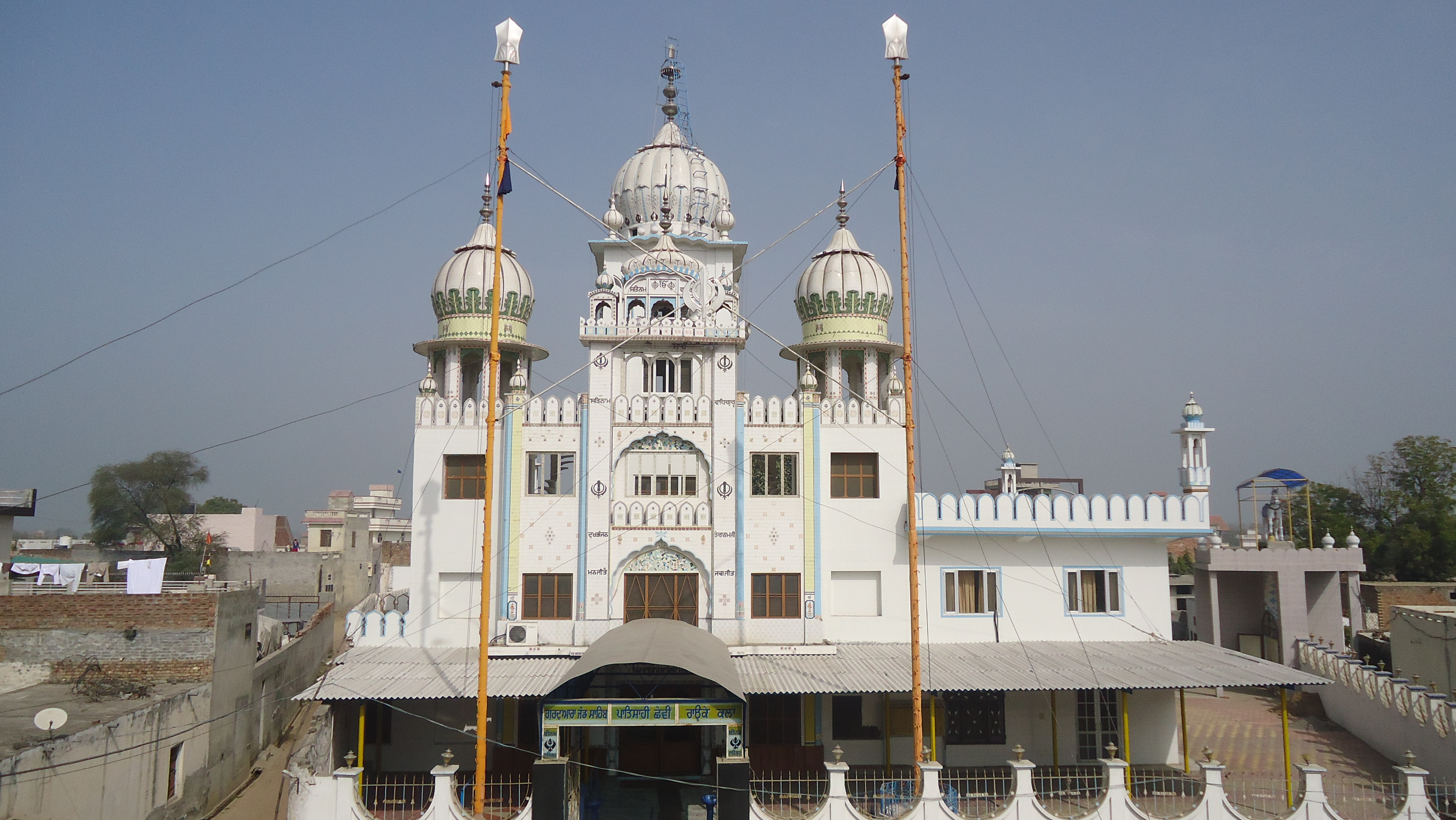 ਪੰਜਾਬੀ: ਪਿੰਡ ਰਾਊਕੇ ਕਲਾਂ ਛੇਵੇਂ ਗੁਰੂ ਸ੍ਰੀ ਗੁਰੂ ਹਰਿਗੋਬਿੰਦ ਸਾਹਿਬ ਜੀ ਦੀ ਚਰਨ ਛੋਹ ਪ੍ਰਾਪਤ ਧਰਤੀ ਹੈ।